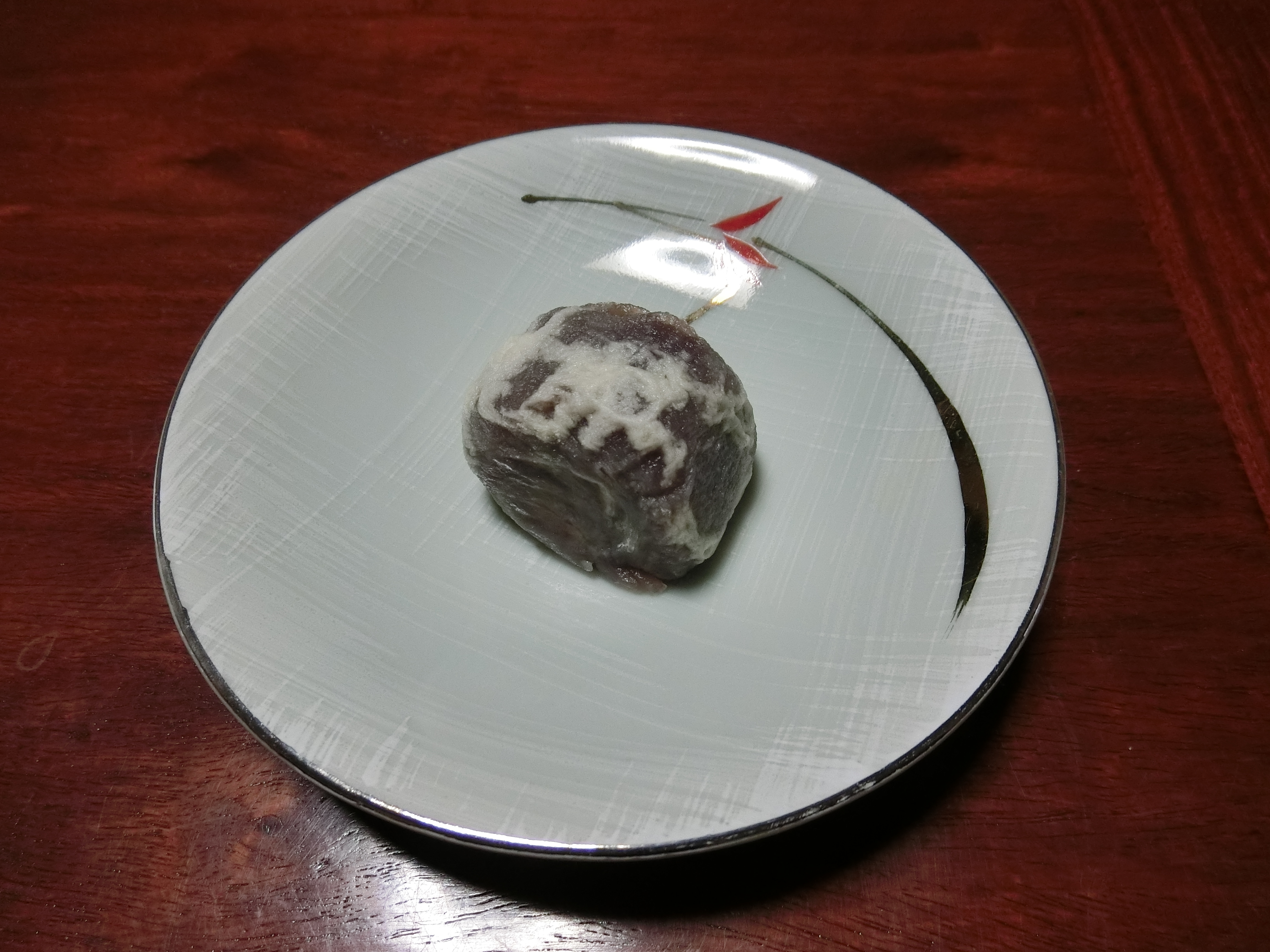 岡山県の和菓子